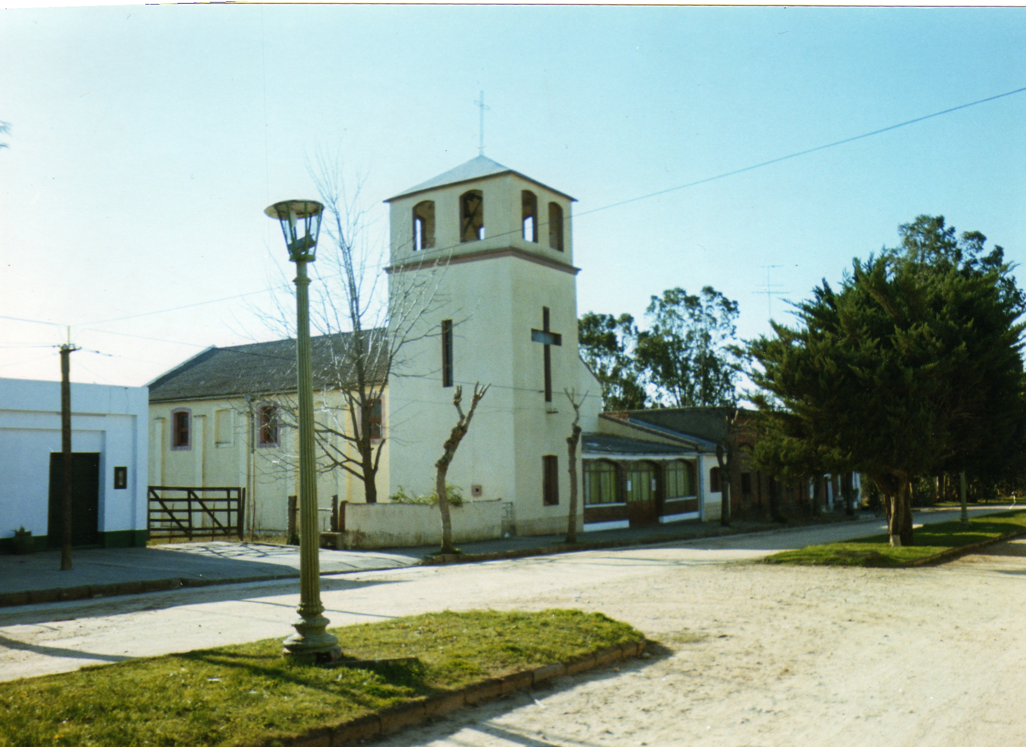 Parroquía y Av Artigas de La Cruz Uruguay